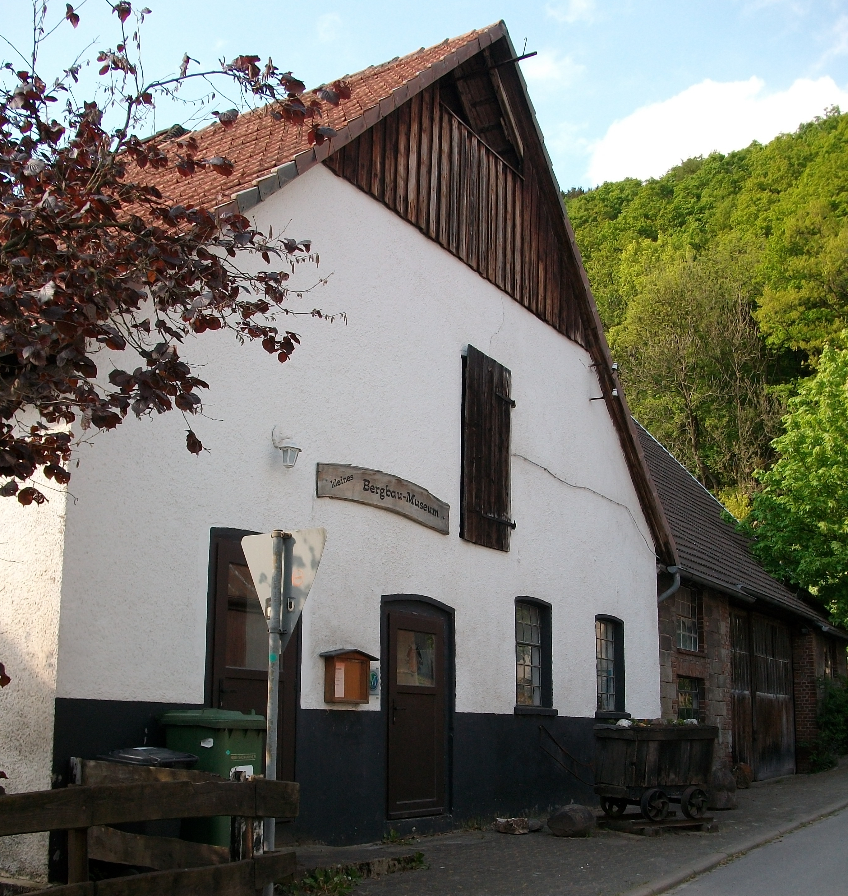 Kleines Bergbau-Museum in Sundern-Hagen (Germany)